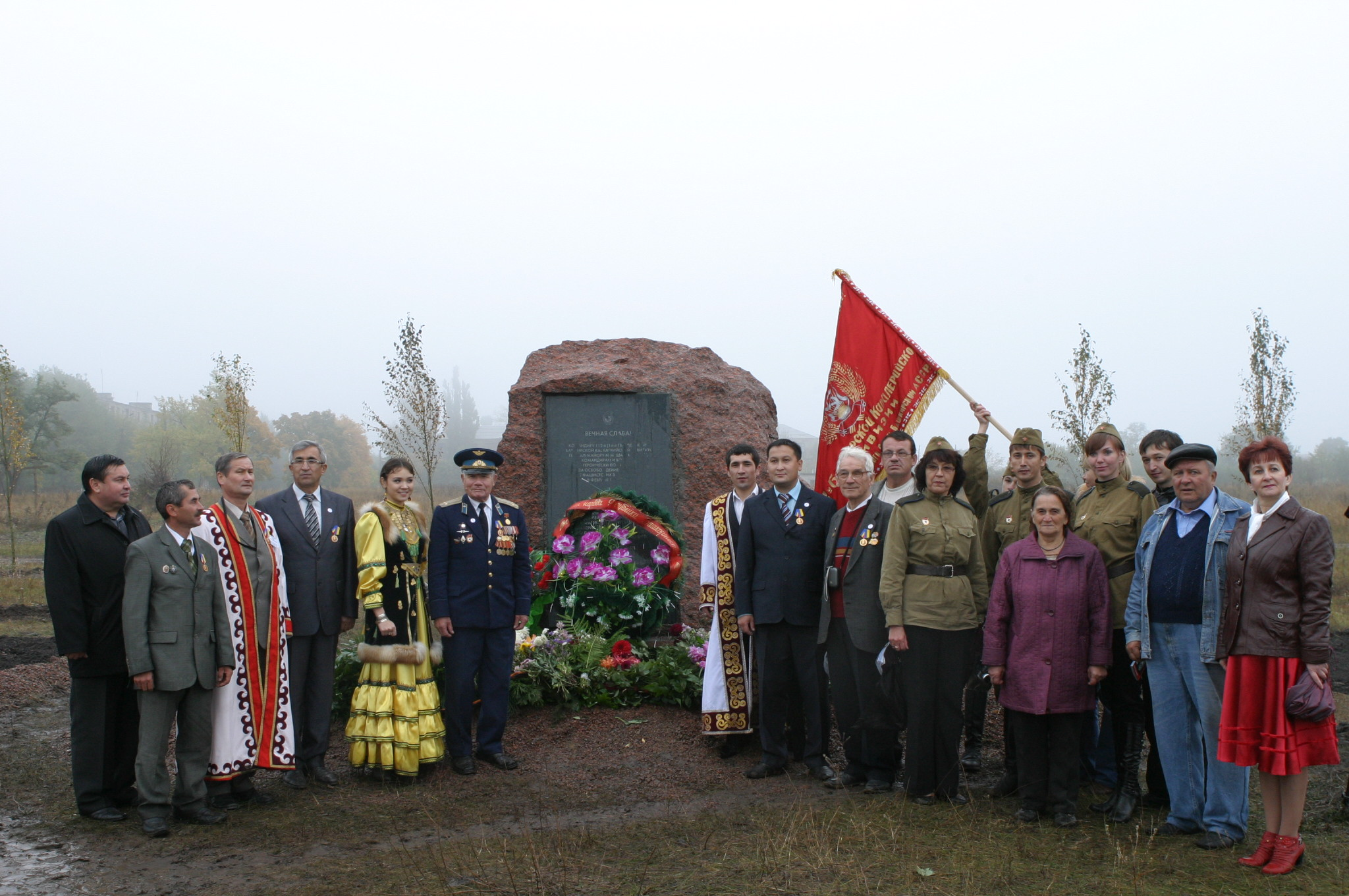 Делегация Башкортостана. Акция "Дорогами славных конников".Из архива РОО ВИК "1-й башкирский конный полк - "Любизар" Республики Башкортостан.